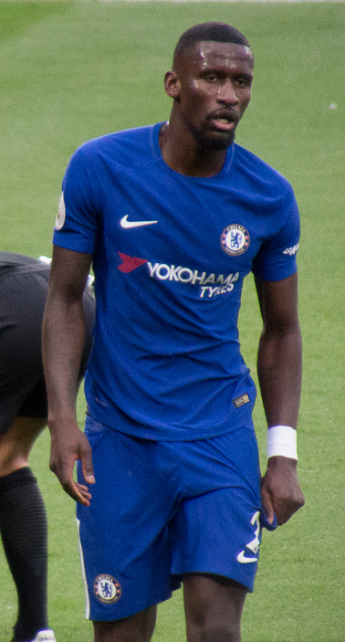 Chelsea 0 Manchester City 1 30.9.17